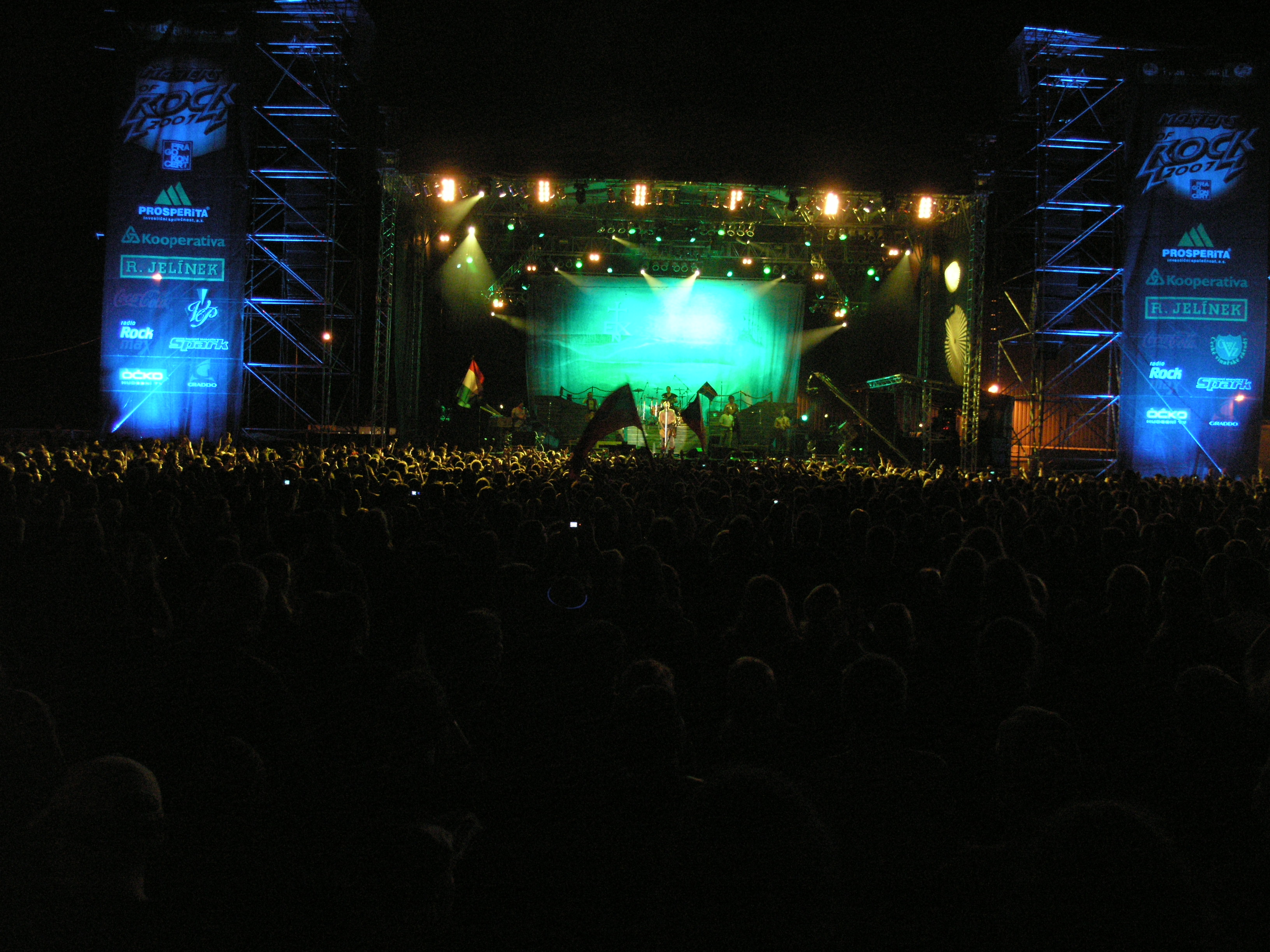 Zespół In Extremo w czasie festiwalu Masters of Rock 2007